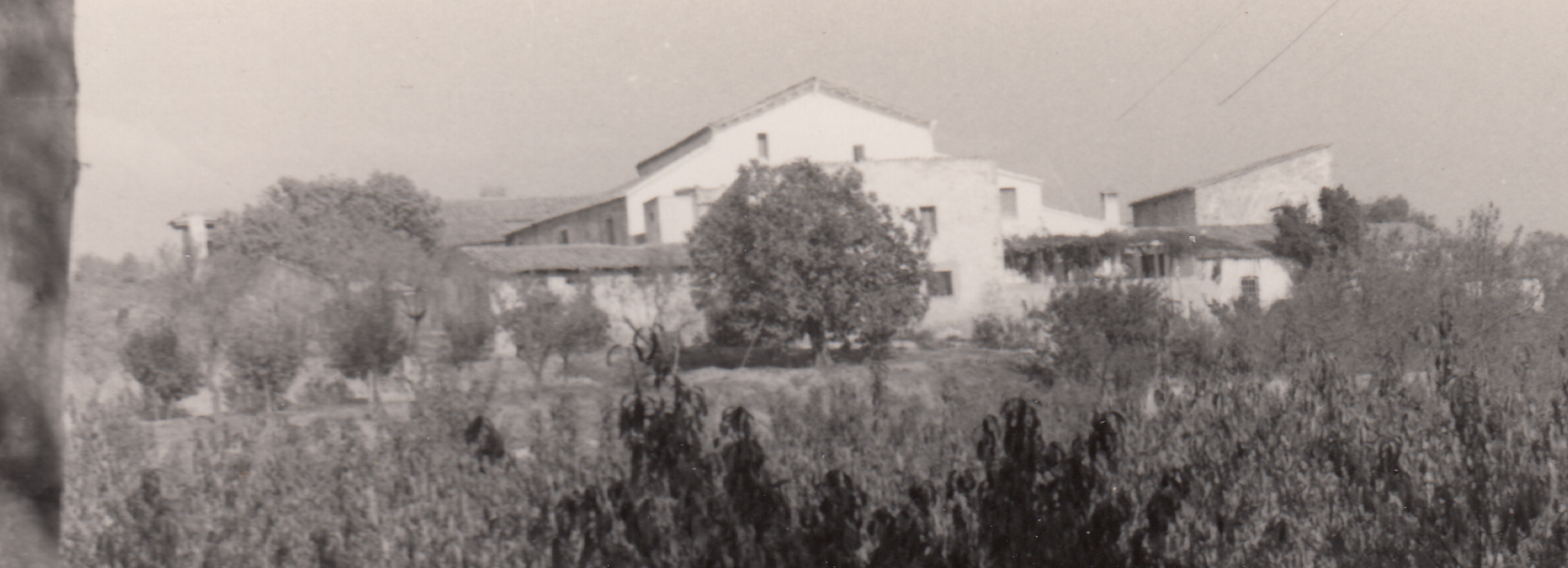 Masía de Polinyà